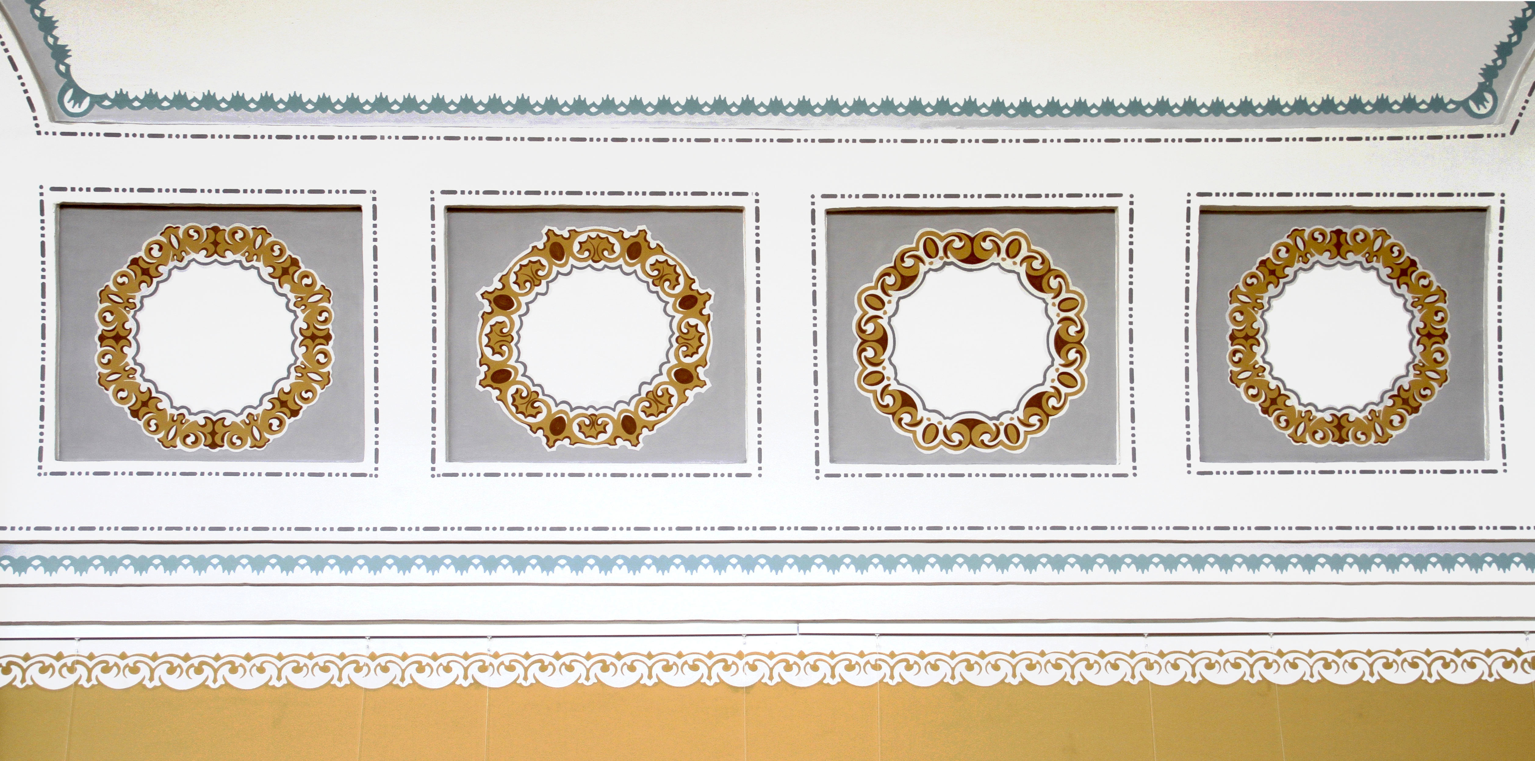 Hauptzollamt München, Schablonenmaleri im Revisionsbüro im ersten Obergeschoss. Restauriert bis 1987 nach Farbresten und Fotos aus der Bauzeit 1912